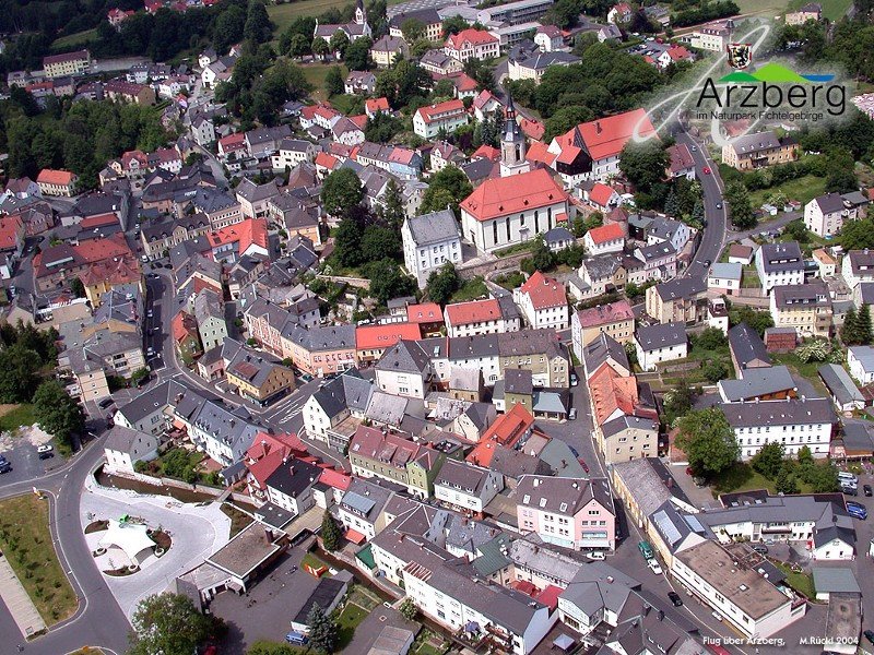 Bildbeschreibung: Arzberger Innenstadt aus der Luft Quelle: Fotograf: Michael Rückl, TSP-Medientechnik, Arzberg Datum: Juni 2003 Sonstiges: Genehmigung unter GFDL erteilt.